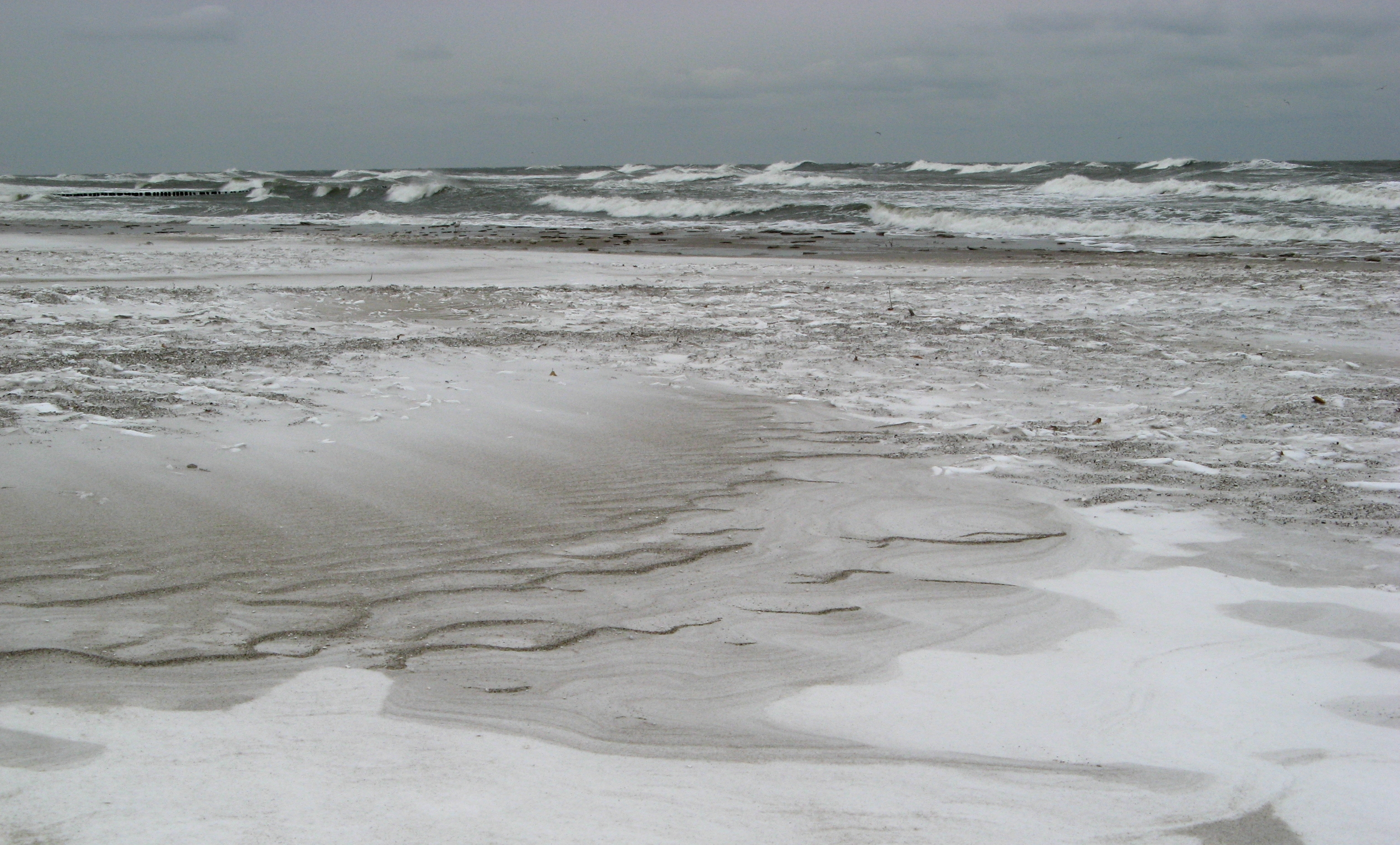 Piasek i śnieg